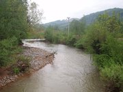 Зелени Јадар